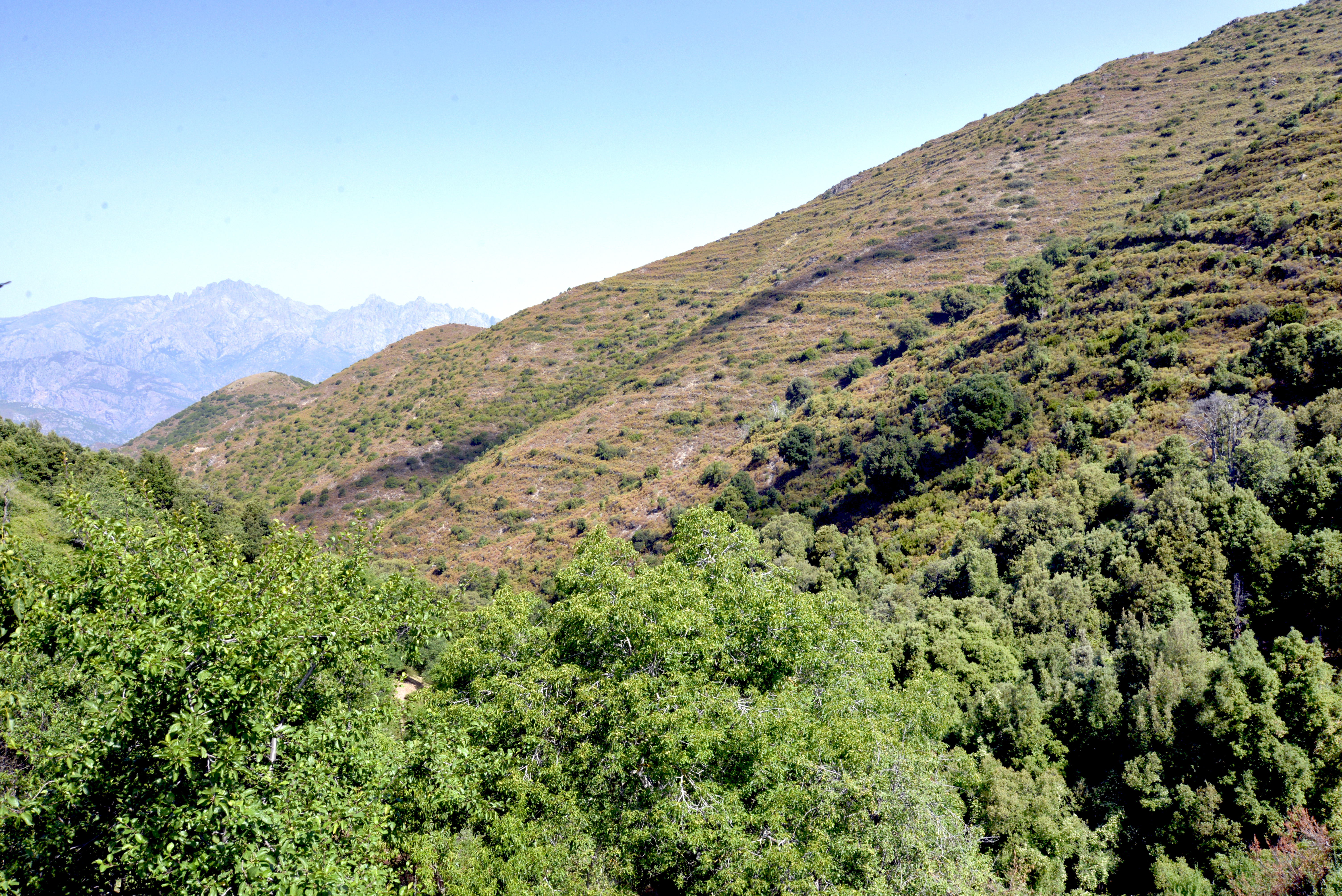 Tralonca, Centre Corse - Les nombreuses anciennes terrasses de culture au nord du village